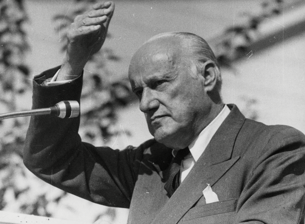 Jorge Alessandri Rodríguez, Presidente de Chile